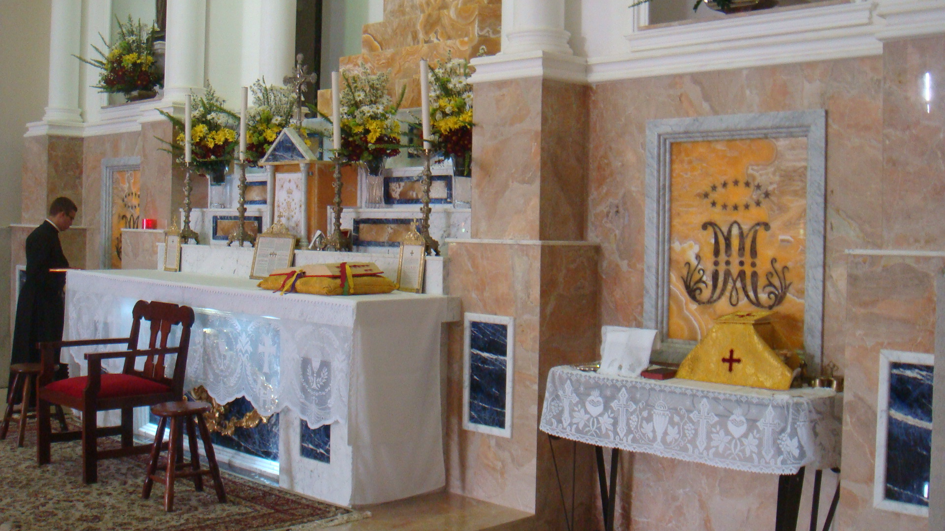 Altar-mor sendo preparado por um seminarista/padre usando batina para a celebração da Missa tridentina, na "Igreja Matriz Pessoal de Nossa Senhora Aparecida e São Fidélis", pertencente a Administração Apostólica Pessoal São João Maria Vianney, na cidade de São Fidélis, Brasil. 2013